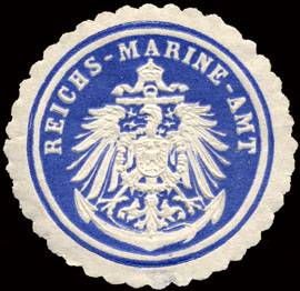 Sealing stamp Title: Reichs - Marine - Amt Description: blau, weiß, geprägt Place: size: 4 cm